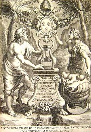 Frontispiece of Lyricorum Libri by Maciej Kazimierz Sarbiewski (Antwerp, 1632)